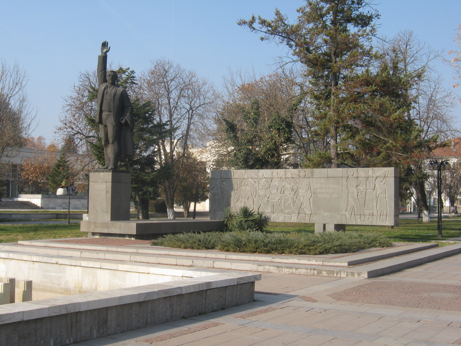 Паметник на Петко Енев в г.НоваЗагора, България.